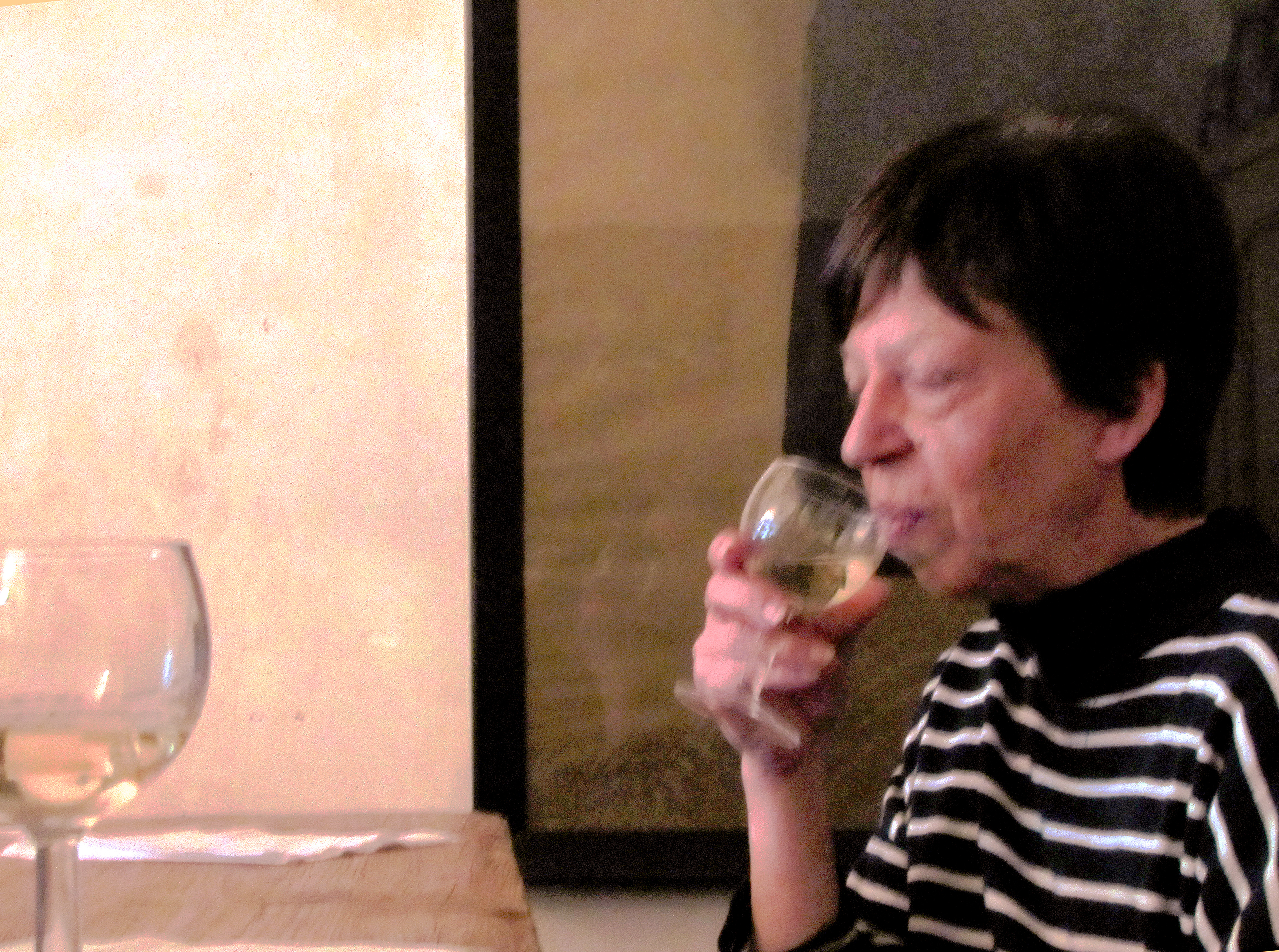 Conférence-dégustation "Vins de la vallée du Rhône. 30 ans d'expérience sur le terrain" par Jean-Pierre Saltarelli - gouter le vin